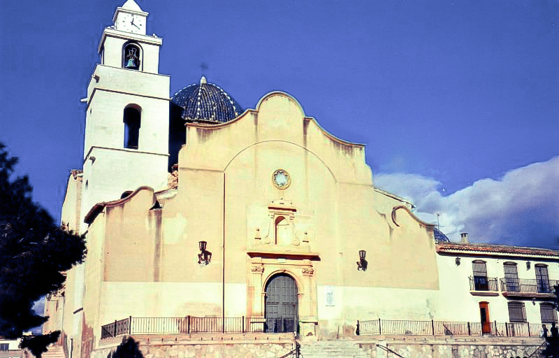 Fachada de la Iglesia de Nuestra Señpra de las Nieves de Monforte del Cid